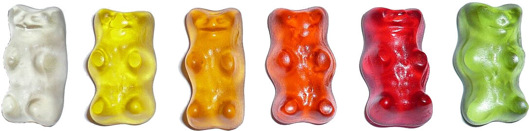 Abbildung der sechs HARIBO Goldbären-Typen, die in Deutschland seit August 2007 erhältlich sind.